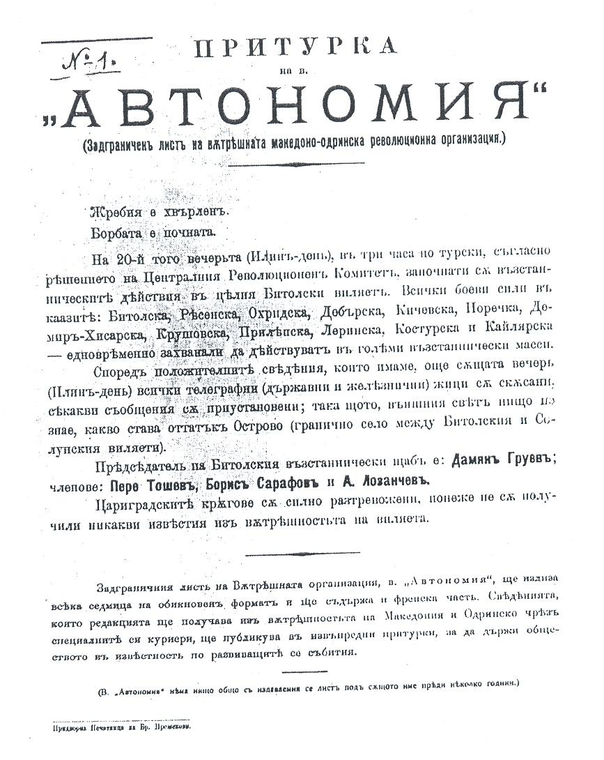 Вестникът на ВМРО "Автономия".